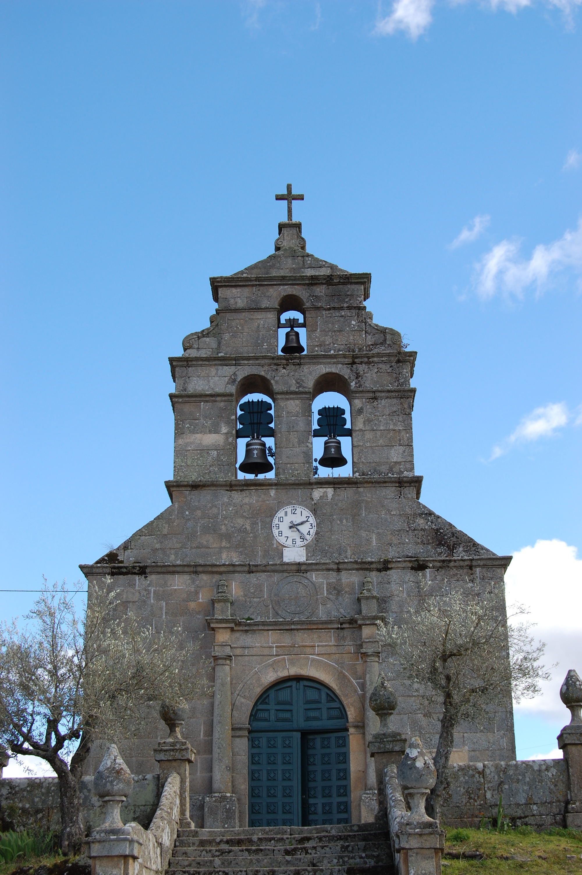 Caçarelhos.